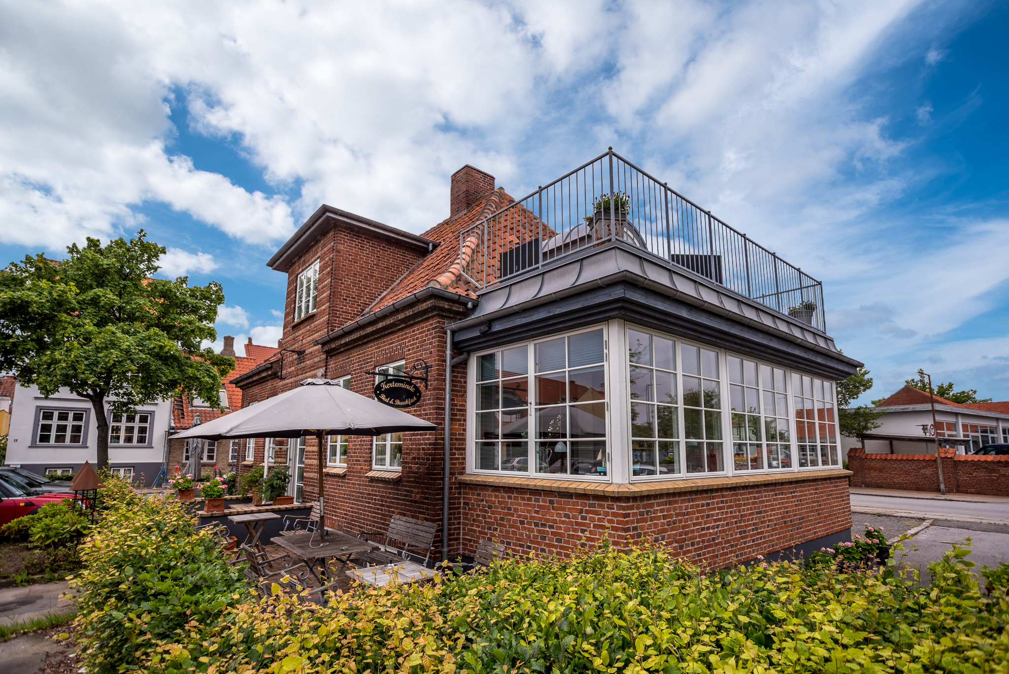 Det gamle sømandshjem er nu Kerteminde Bed & Breakfast